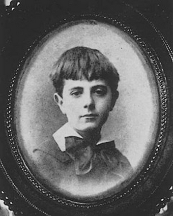 Jacque Bizet (1871-1922), sur une photo ancienne, photographe inconnu.